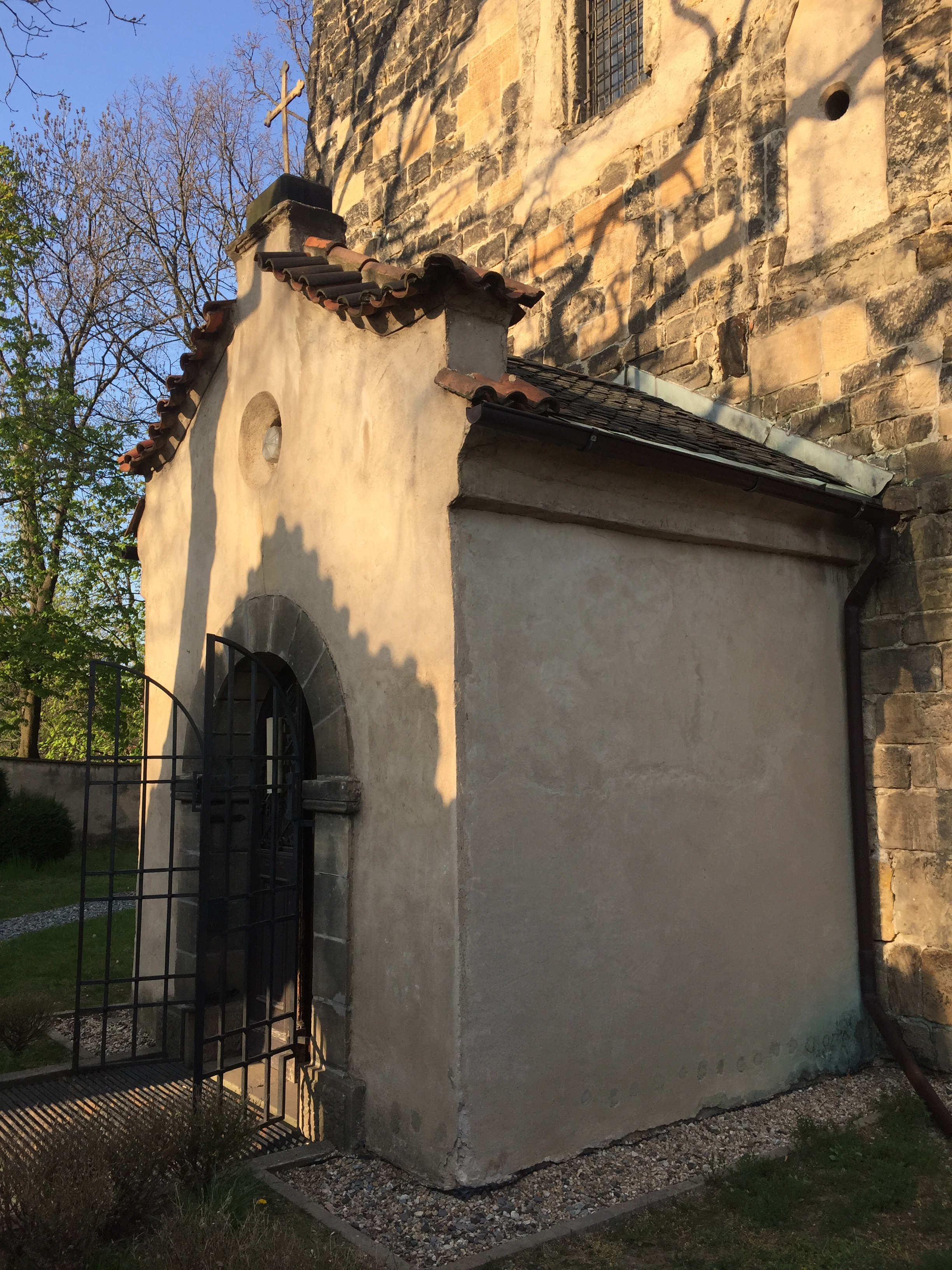 barokní přístavba k nynějšímu hlavnímu vchodu do kostela